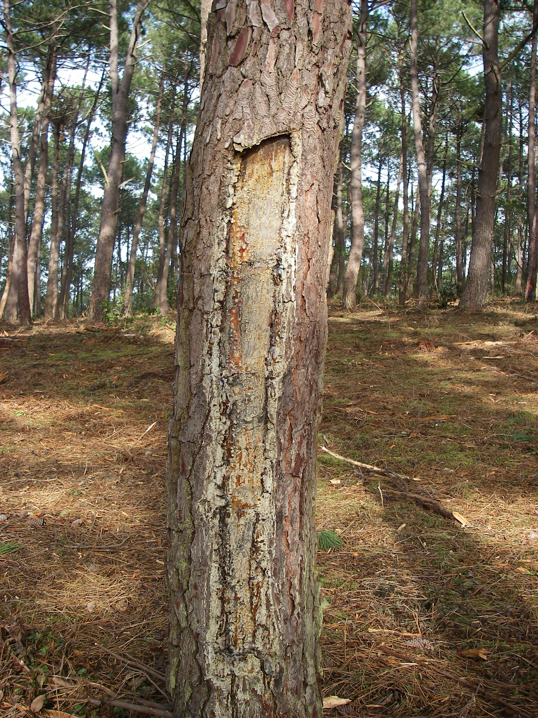 Care gemmée à l'acide sulfurique (La Teste de Buch, Gironde, Aquitaine, France)